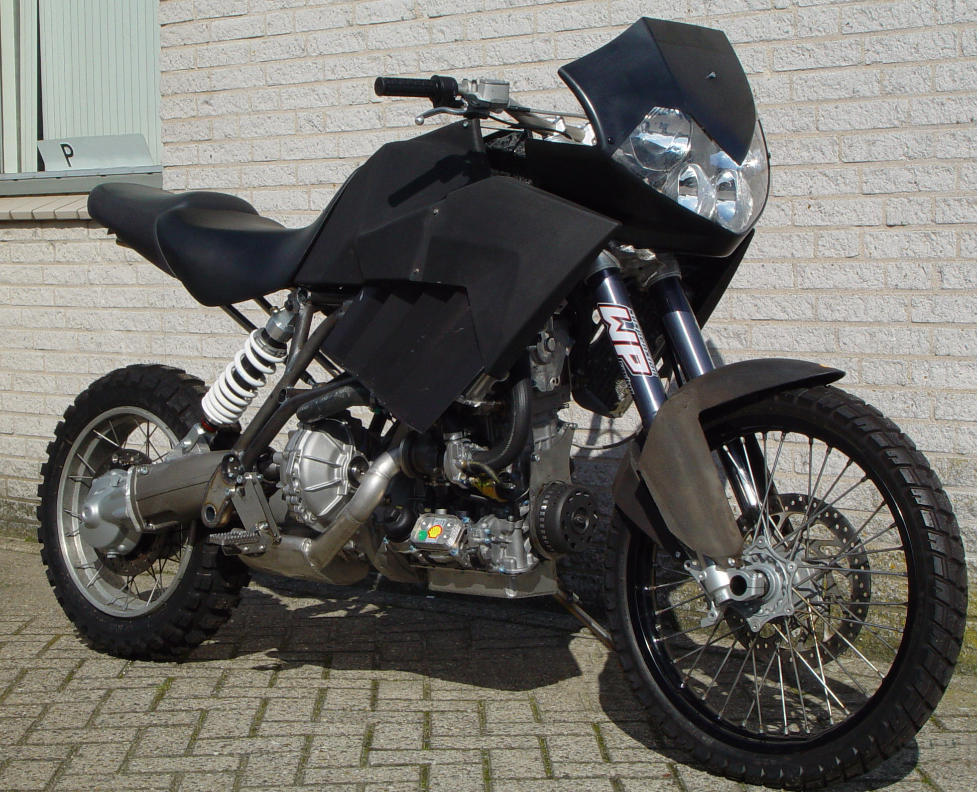 Eigendom evaproducts. geschikt voor vrij gebruik.